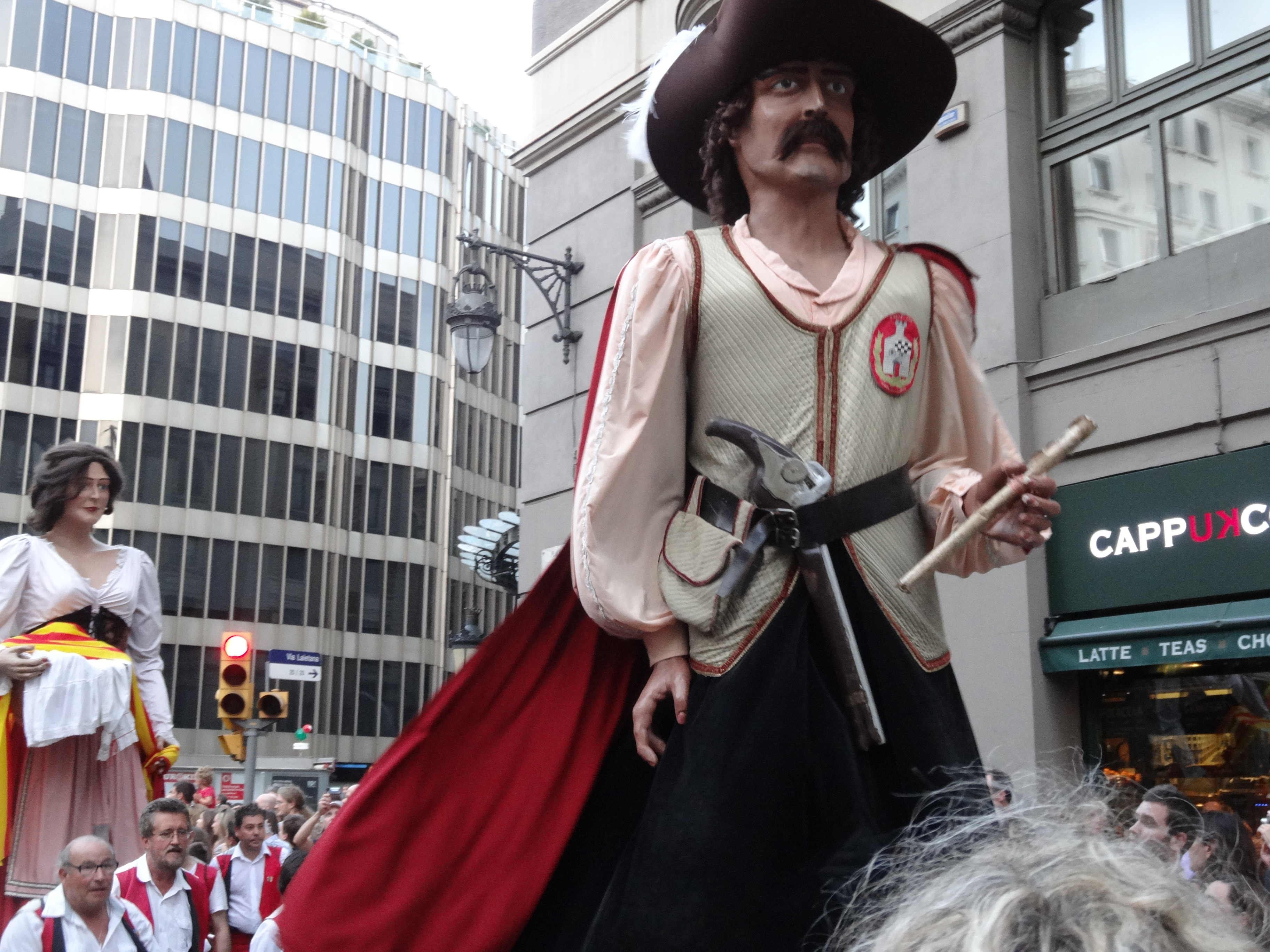 Cercavila de la Mercè 2013 a Barcelona. Gegant Perot Rocaguinarda, d'Horta